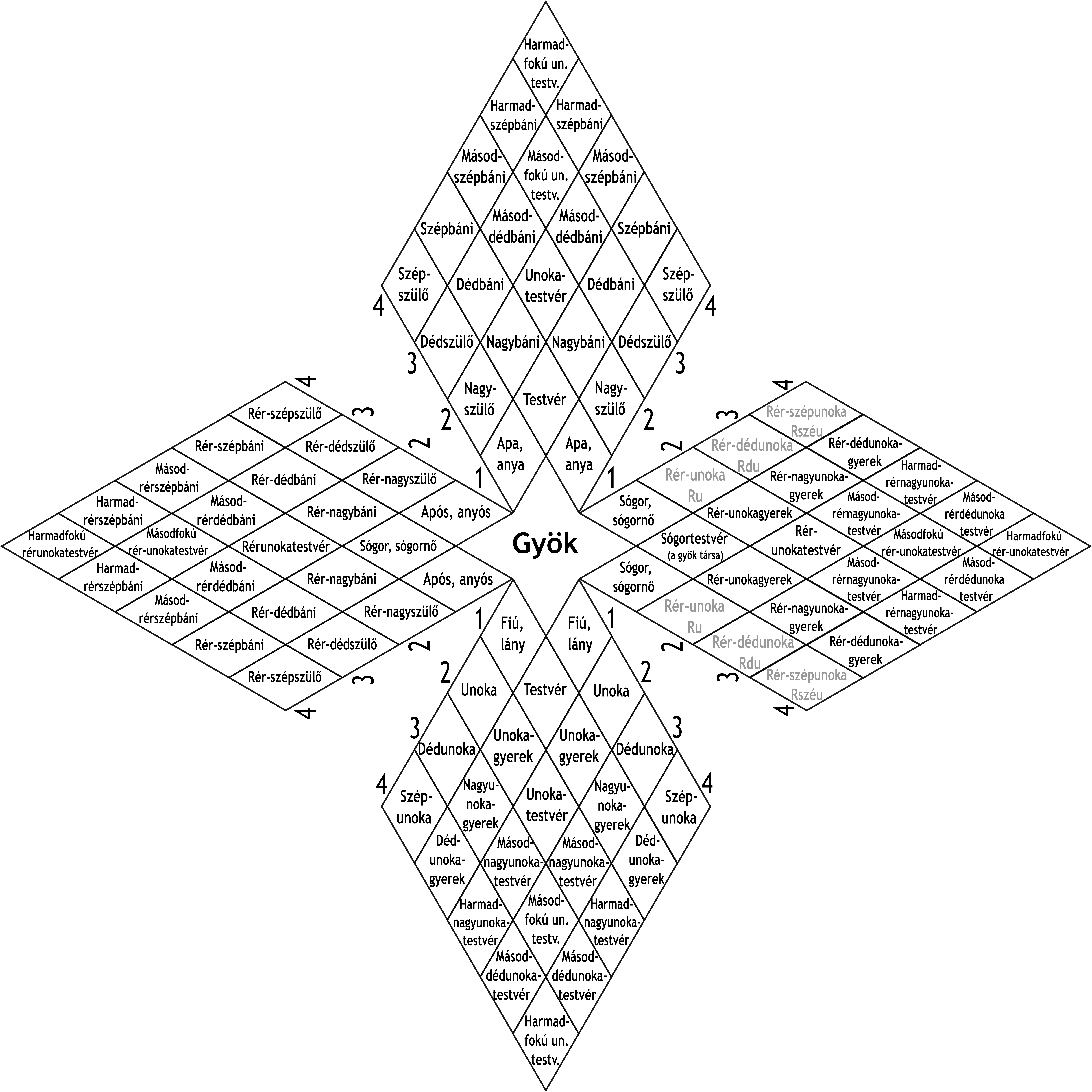 A vérrokonsági és sógorsági rokonság meghatározásának egyesített táblája. Szegedi László, Általános genenalógia. Budapest, 2015. 179. (első préselés) The Hungarian united table to determine the degree of consanguinity and affinity, by László Szegedi, Általános genenalógia. (Comprehensive Genealogy) Budapest, 2015. p. 179.